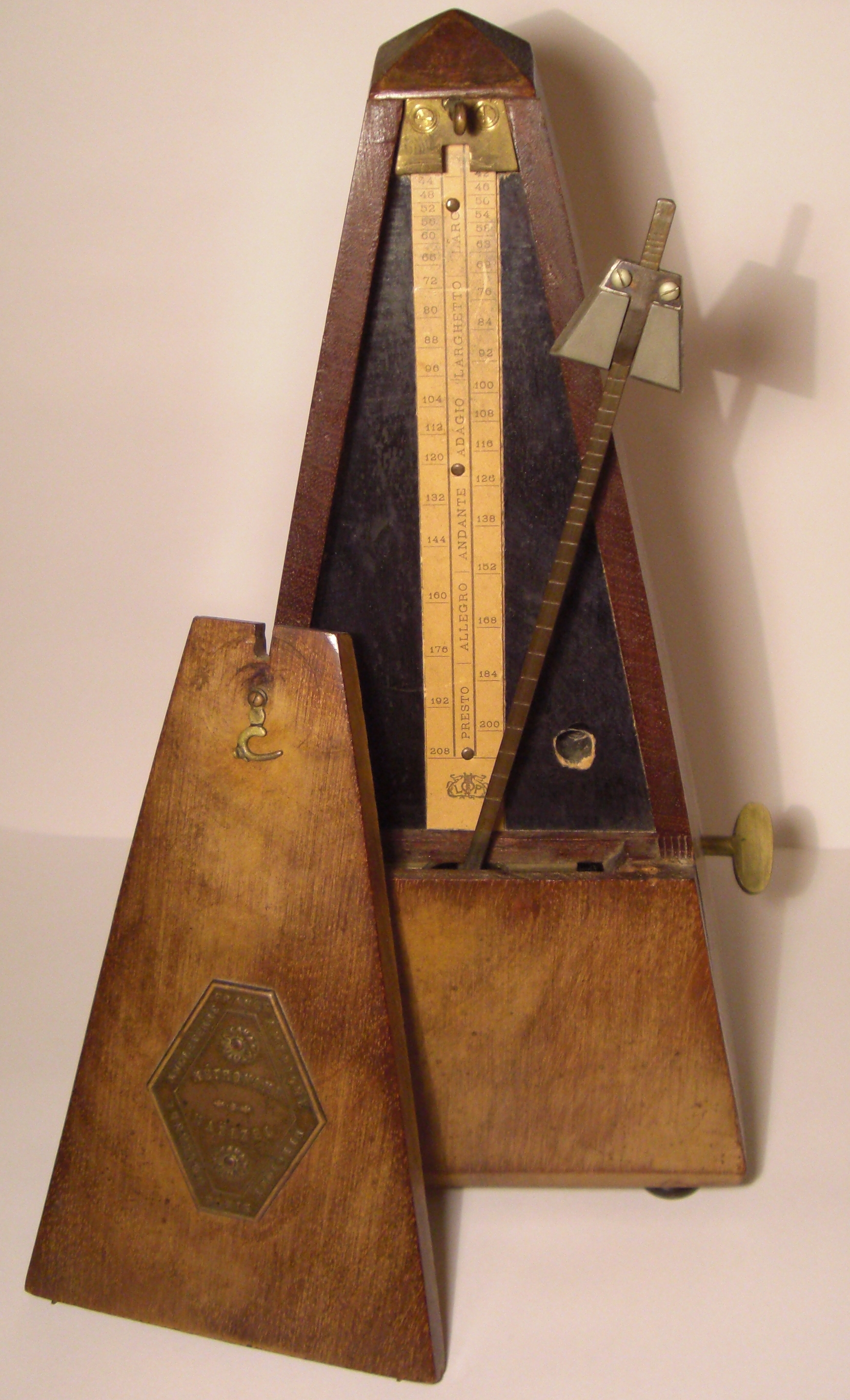 Metronome Mälzel